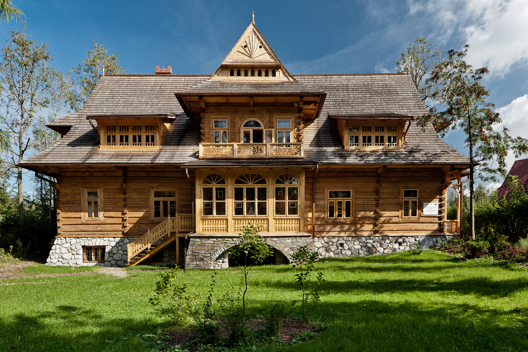 Willa „Oksza”, Zakopane - widok ogólny